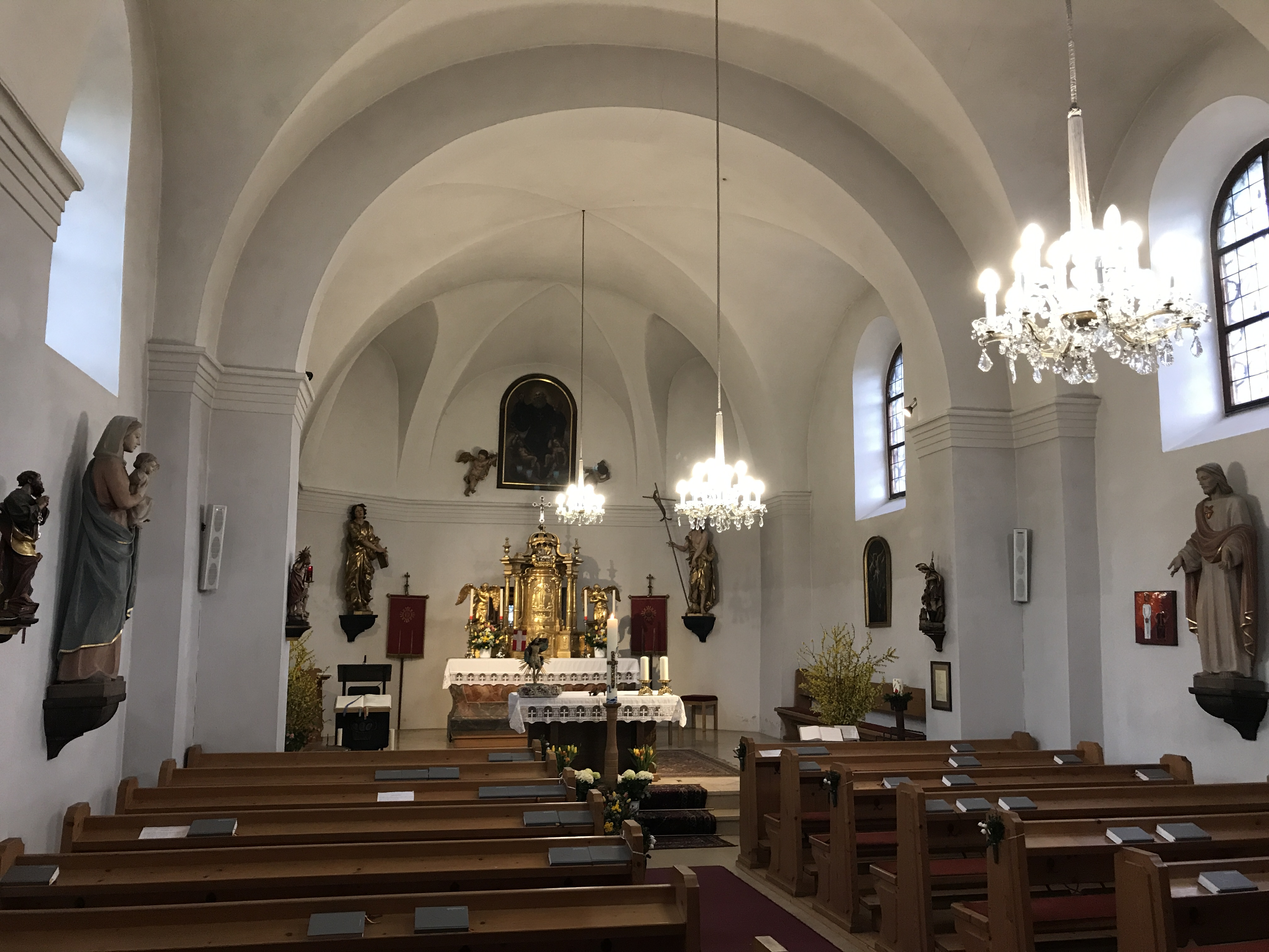 Johanneskirche Ardning (Austria), Pfarre Frauenberg an der Enns